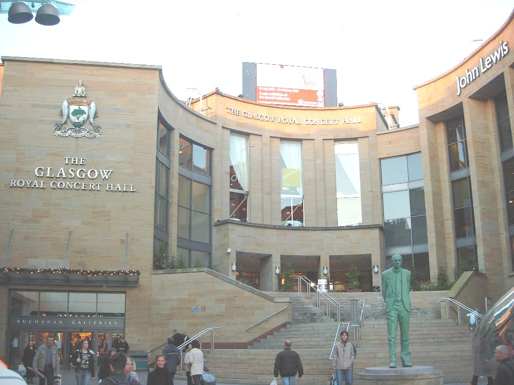 Glasgow Royal Concert Hall mit Donald Dewar-Statue im Vordergrund